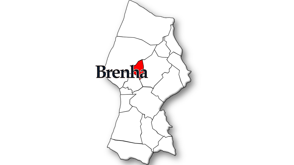 População